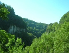 Vue des Gorges de Chailles